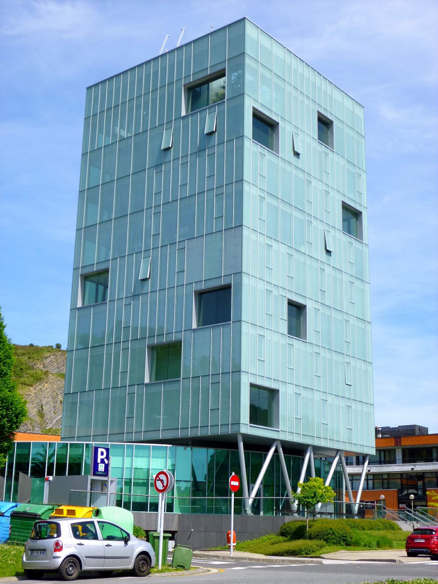 Torre Zaisa, en Behobia (Irún, Gipuzkoa)